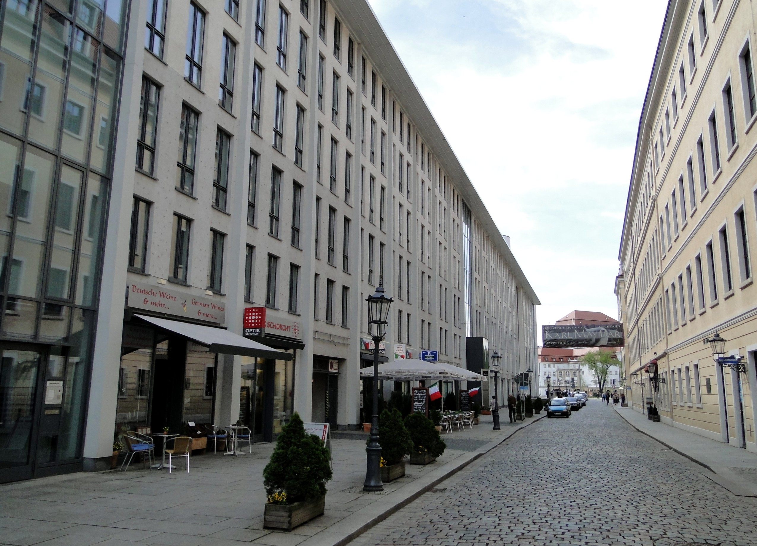 Das Haus am Zwinger (links) rekonstruiert die kleine Brüdergasse